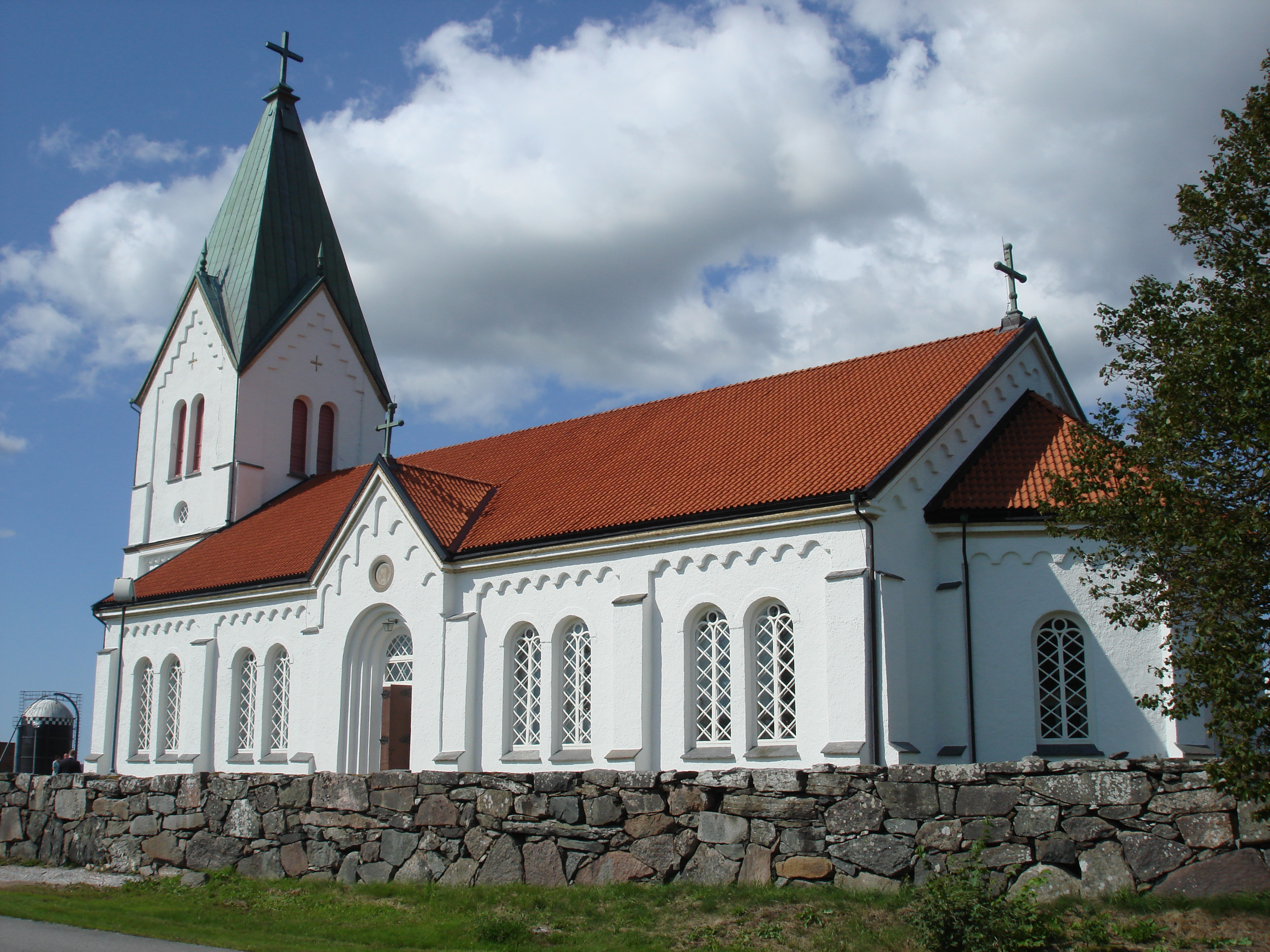 Stala Church, Sweden.